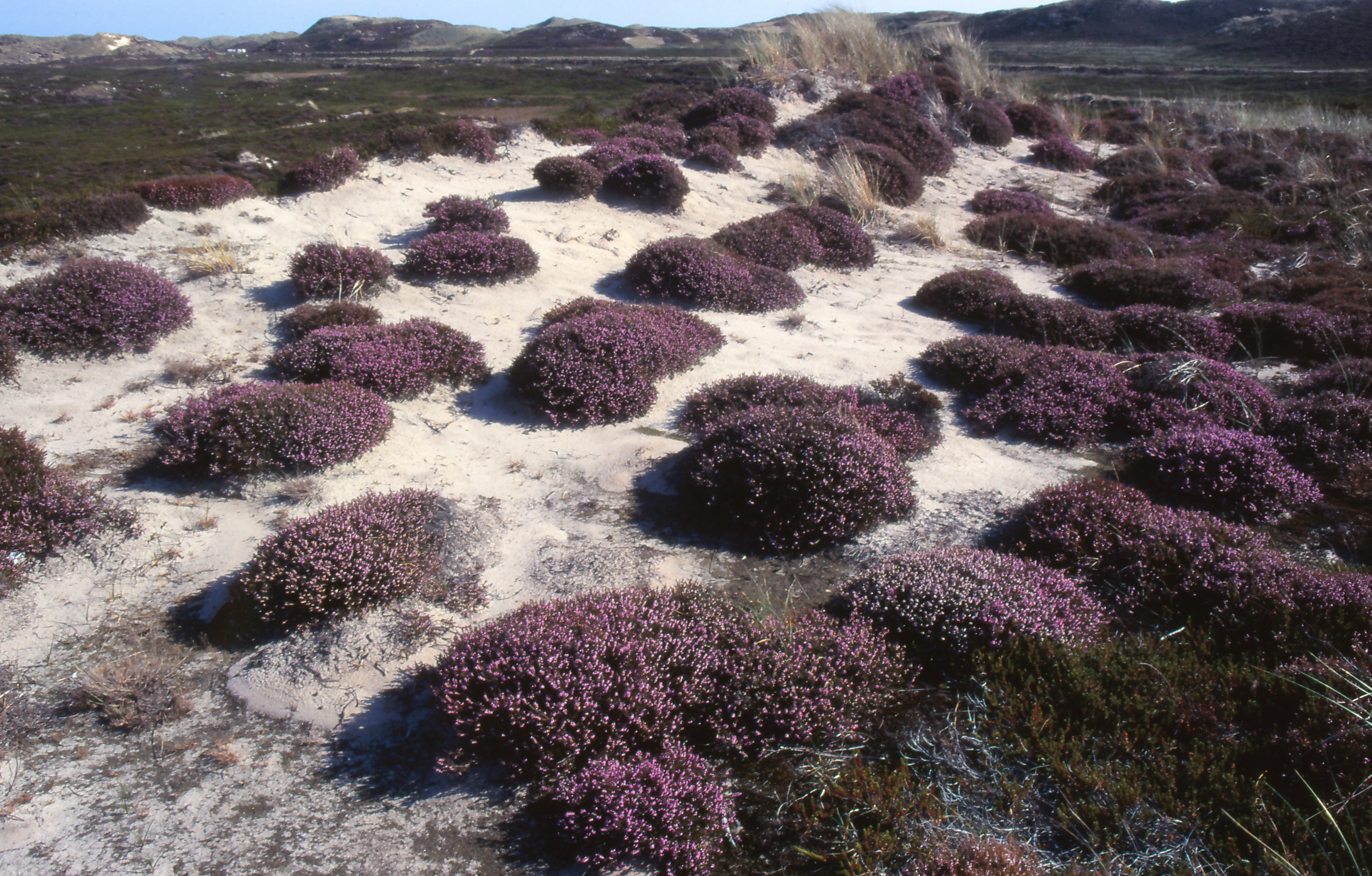 Die Besenheide (Calluna vulgaris) bildet Bulten im Dünenbereich des NSG Nord-Sylt